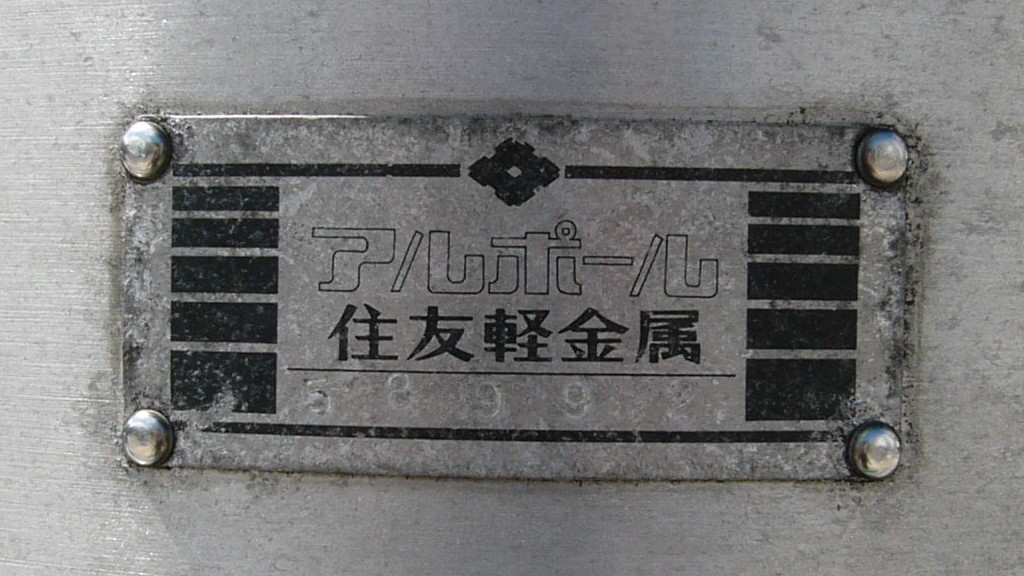 住友輕金屬製造的一根旗桿上的住友輕金屬銘板